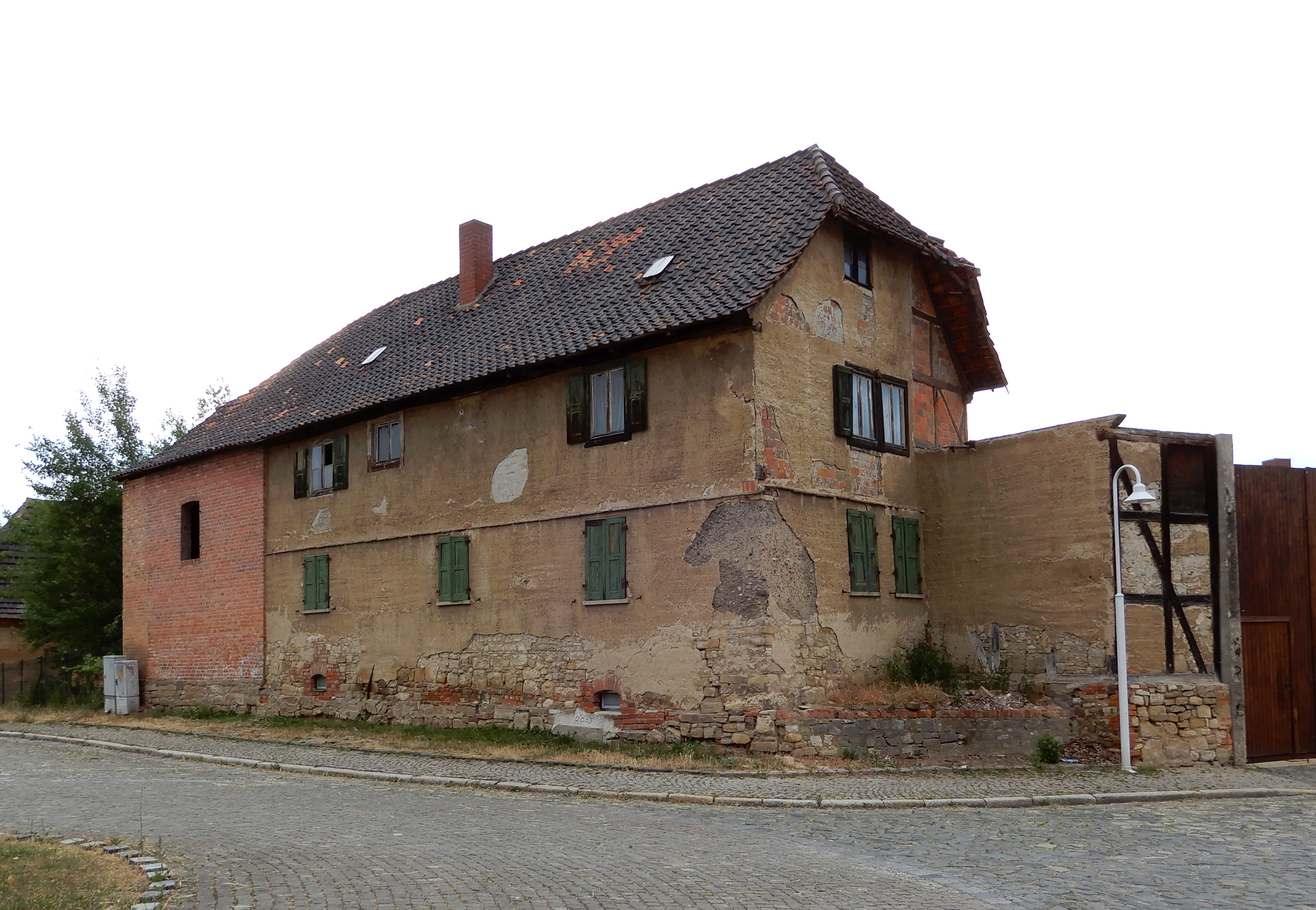 Haus Unter dem Turm 236